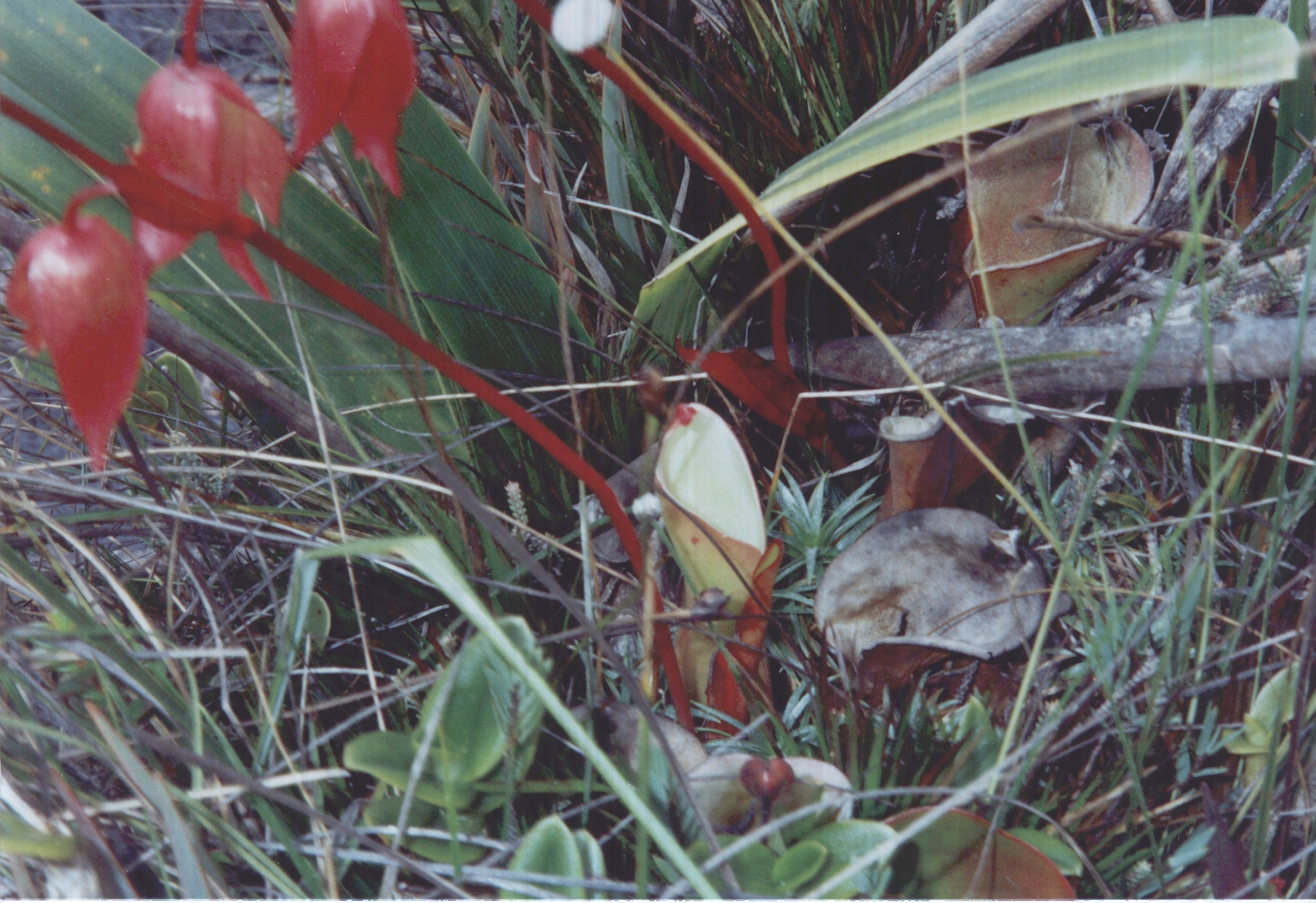 Heliamphora nutans (Habitus), at Mount Roraima, Venezuela